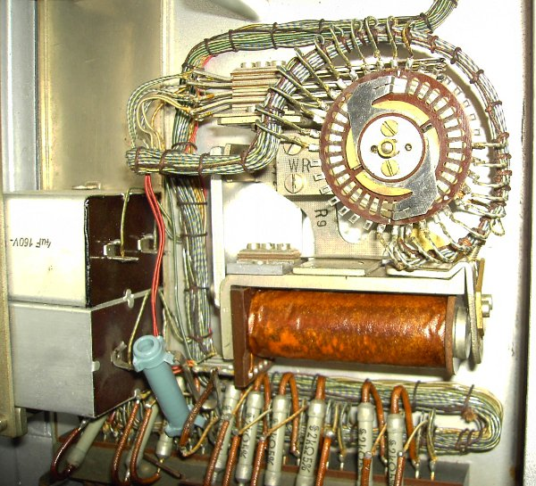 Bild zeigt das Wählerrelais aus dem Zehneranschluss GUm 1/10. gefunden im Museum: De olln Handwarkers ut Worphusen un annere Dörper e.V.